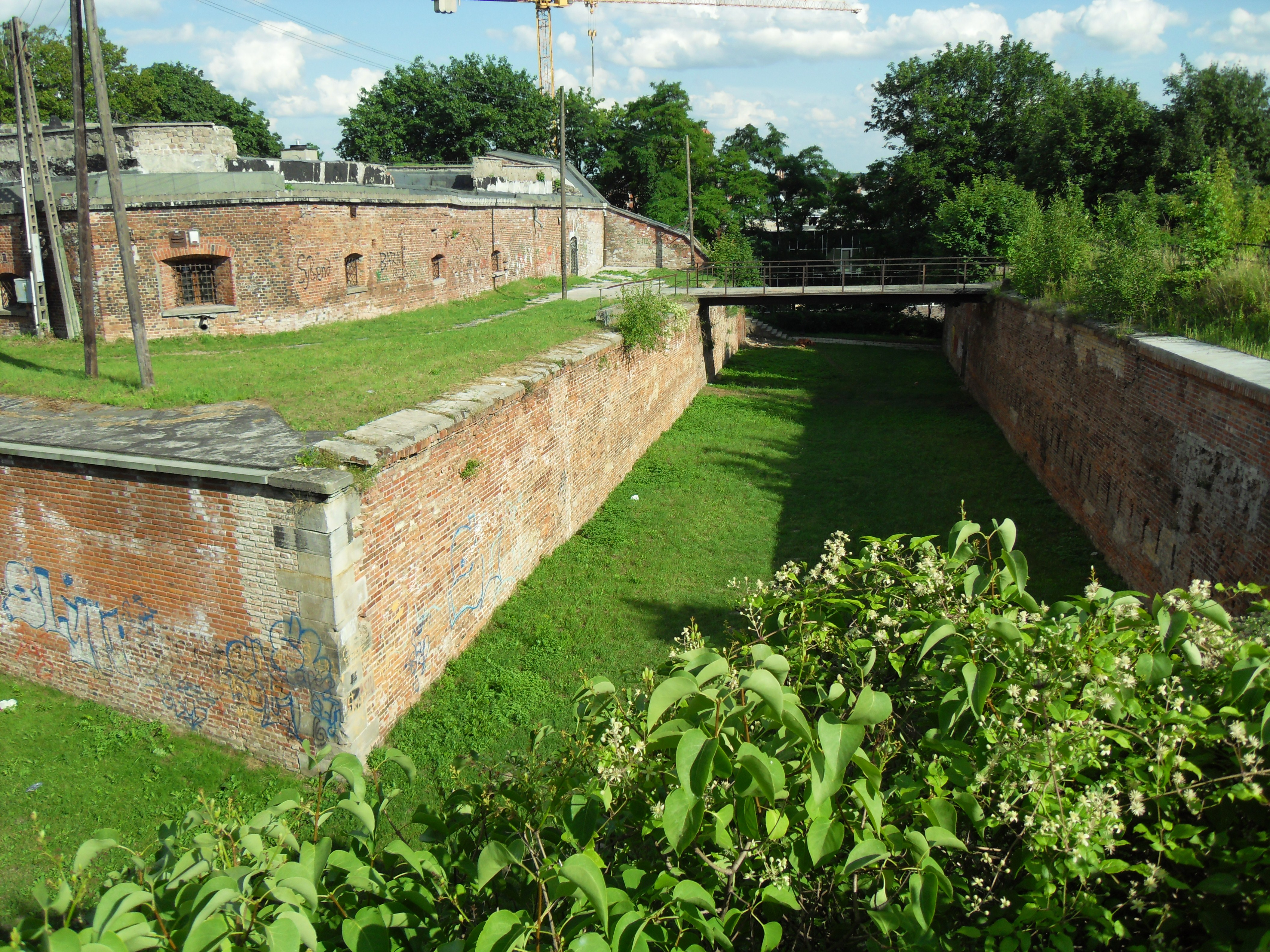 Gdańsk, Reduta Napoleońska w Grodzisku.